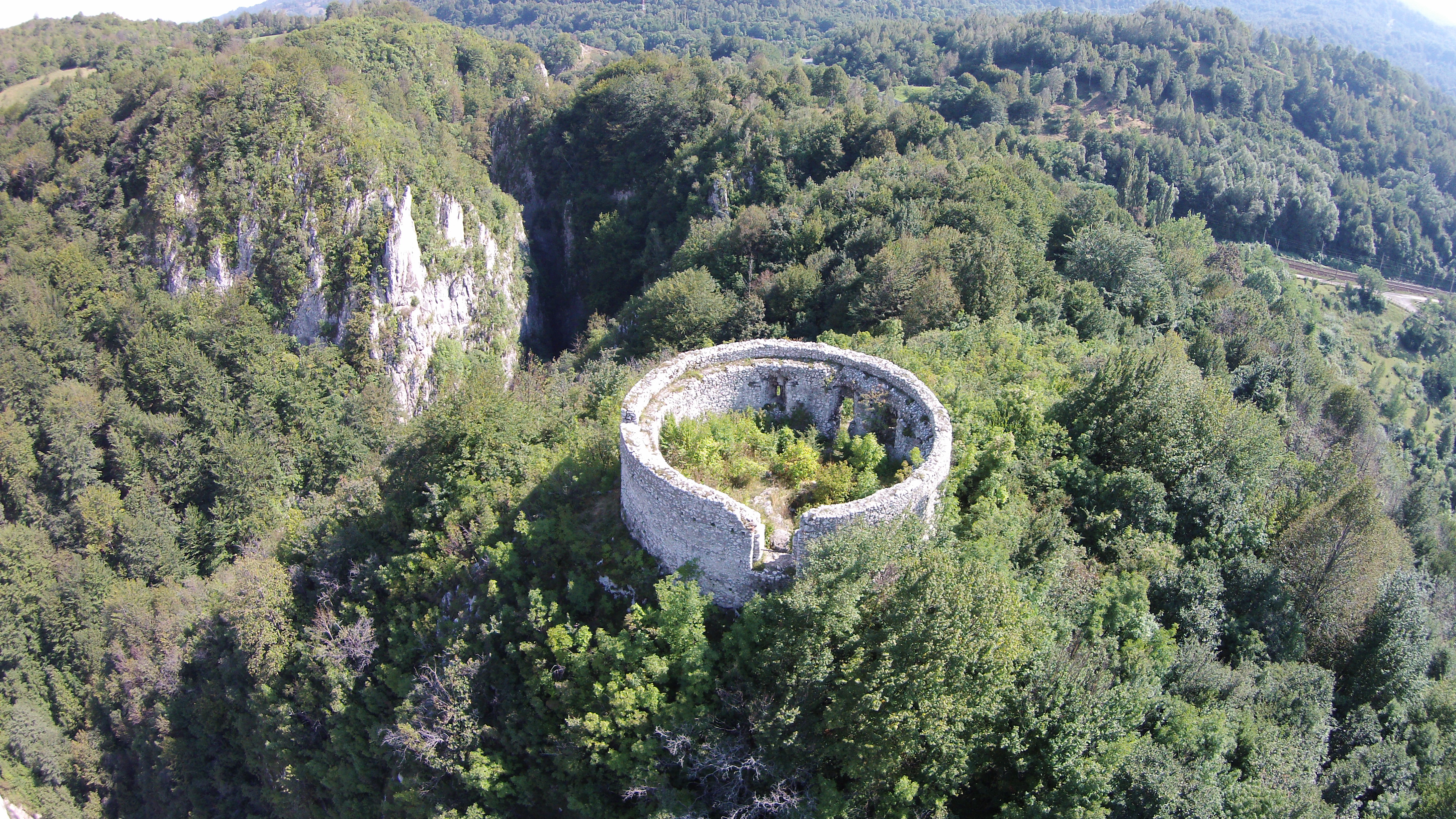 Turn de cetate (ruine)